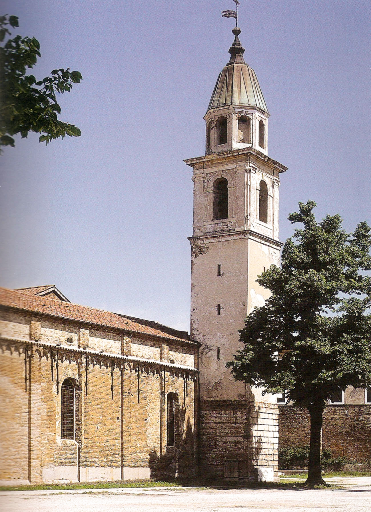 Chiesa e campanile di San Domenico